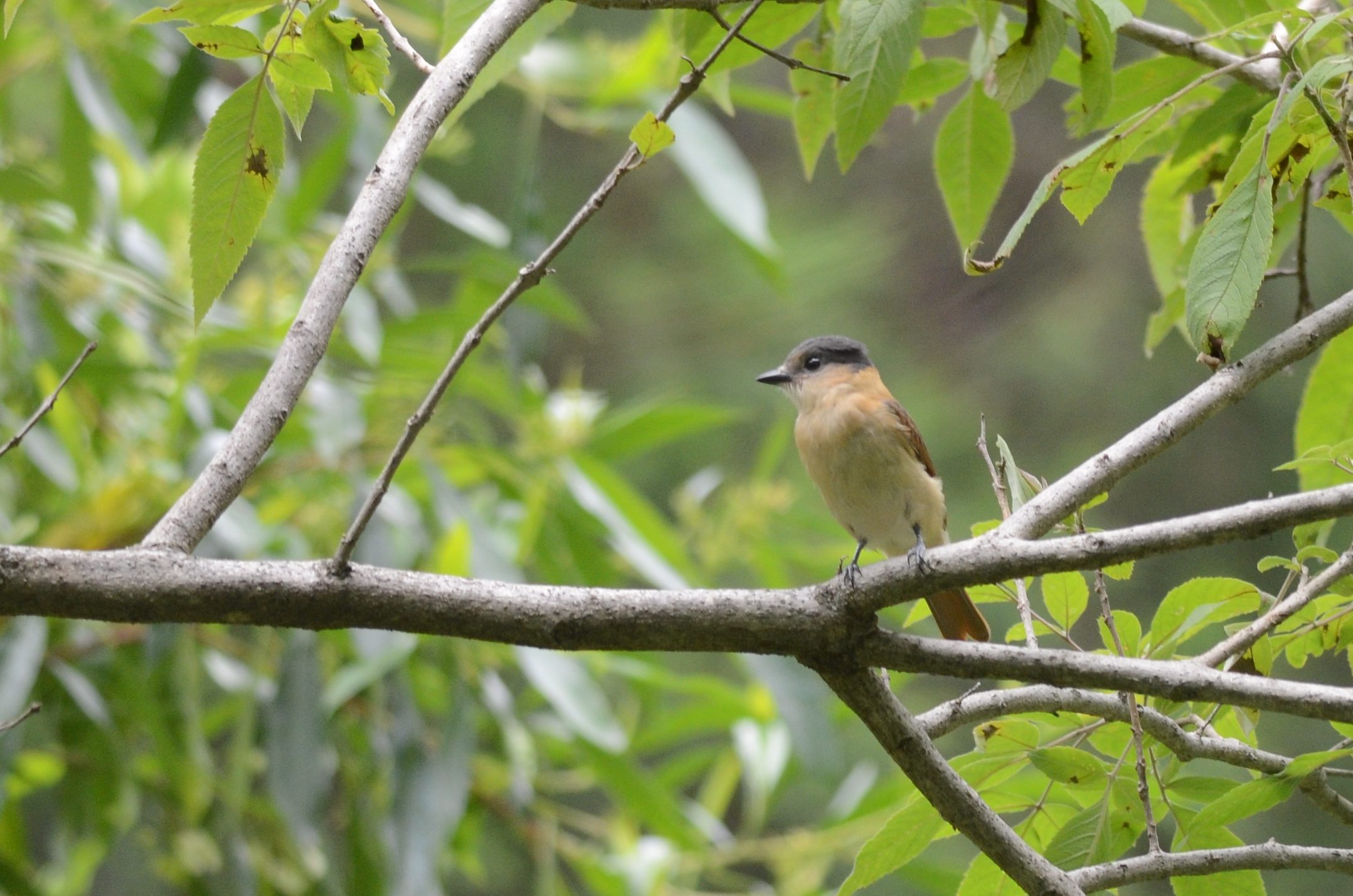 Tepoztlán, Morelos, México, Agosto 20123